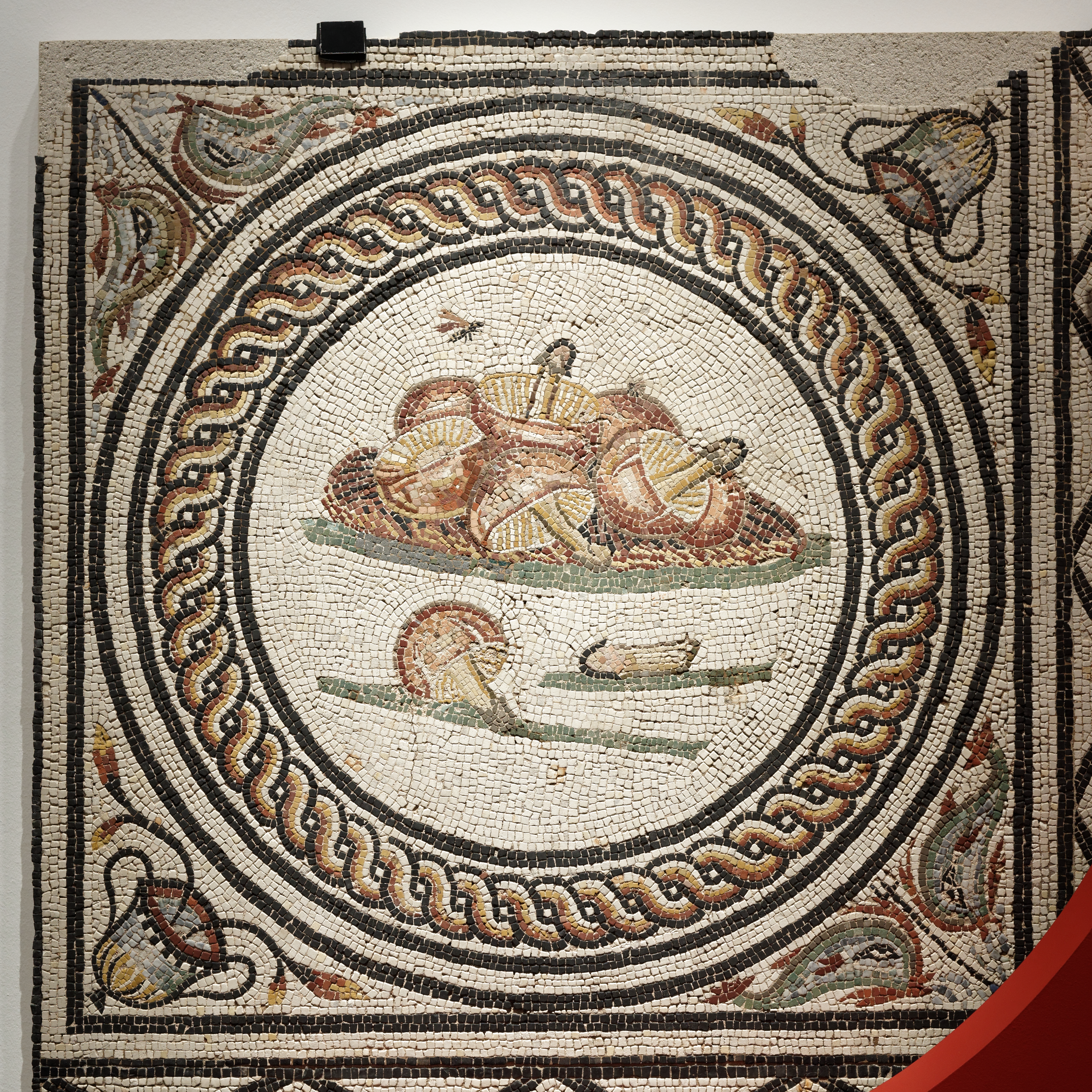 Mosaïque des Xenia Marbre, pierre et verre Saint-Romain-en-Gal-Vienne, Musée gallo-romain, inv SRG1991.1.0700